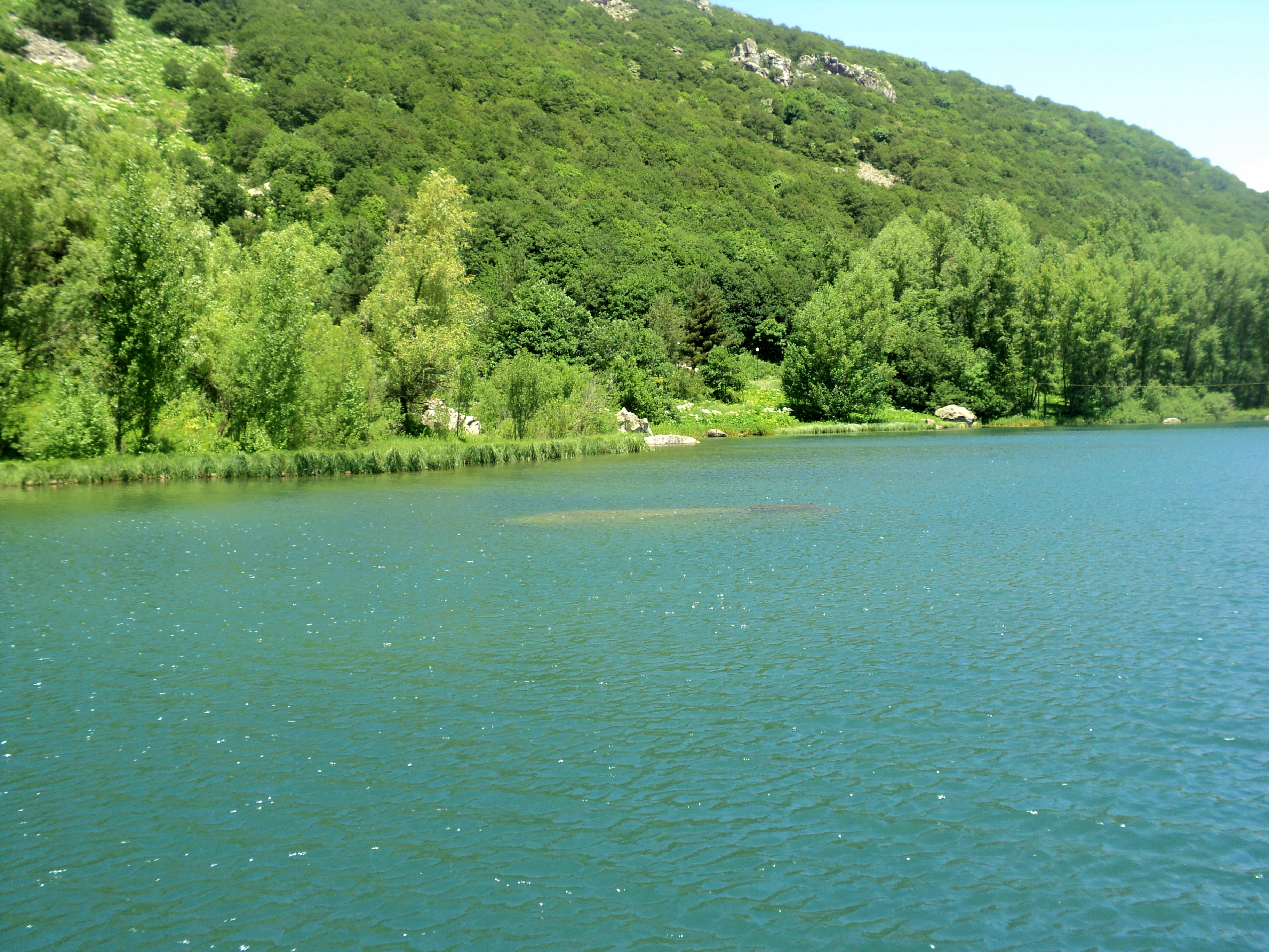 Յոթաղբյուր, Ջերմուկ